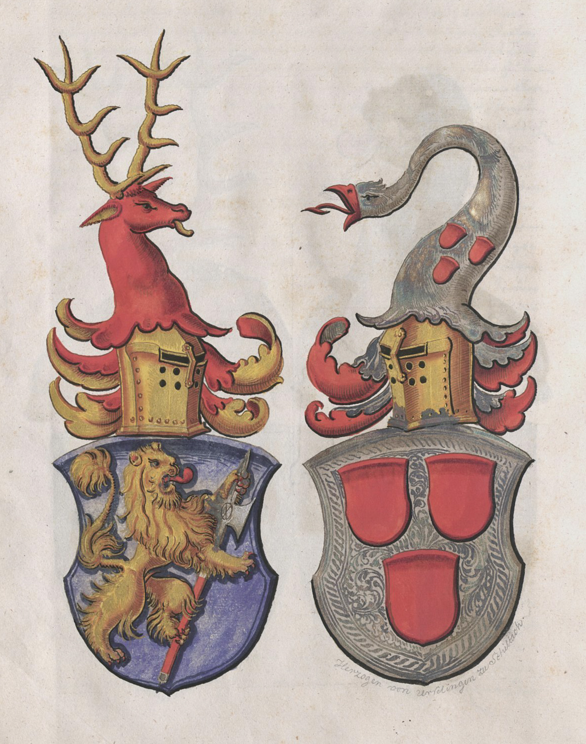 Wappen aus der Zimmerischen Chronik, Handschrift B, Württembergische Landesbibliothek Stuttgart, Cod. Don. 580a, S. 78, Allianzwappen Zimmern / Urslingen